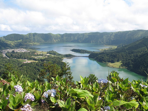 Seven Cities Lake - Azores